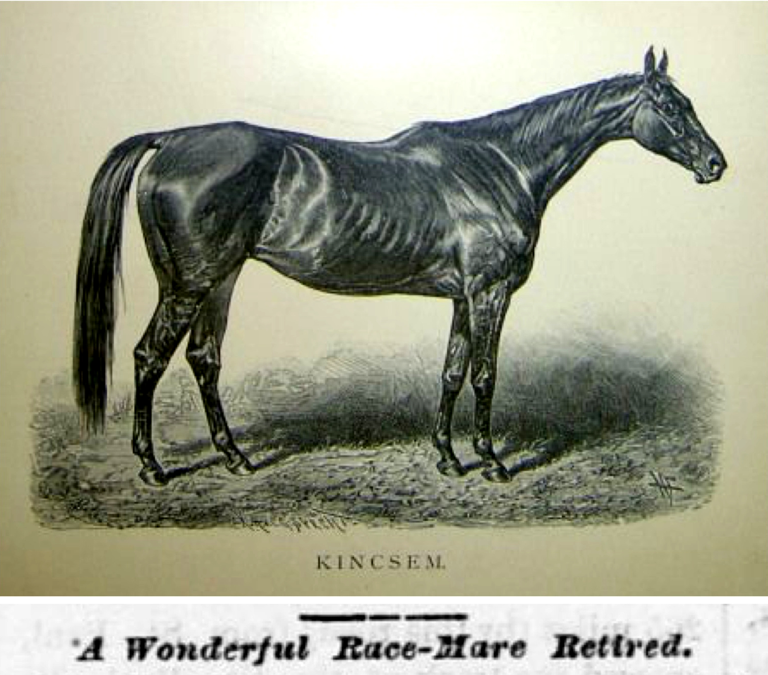 Kincsem